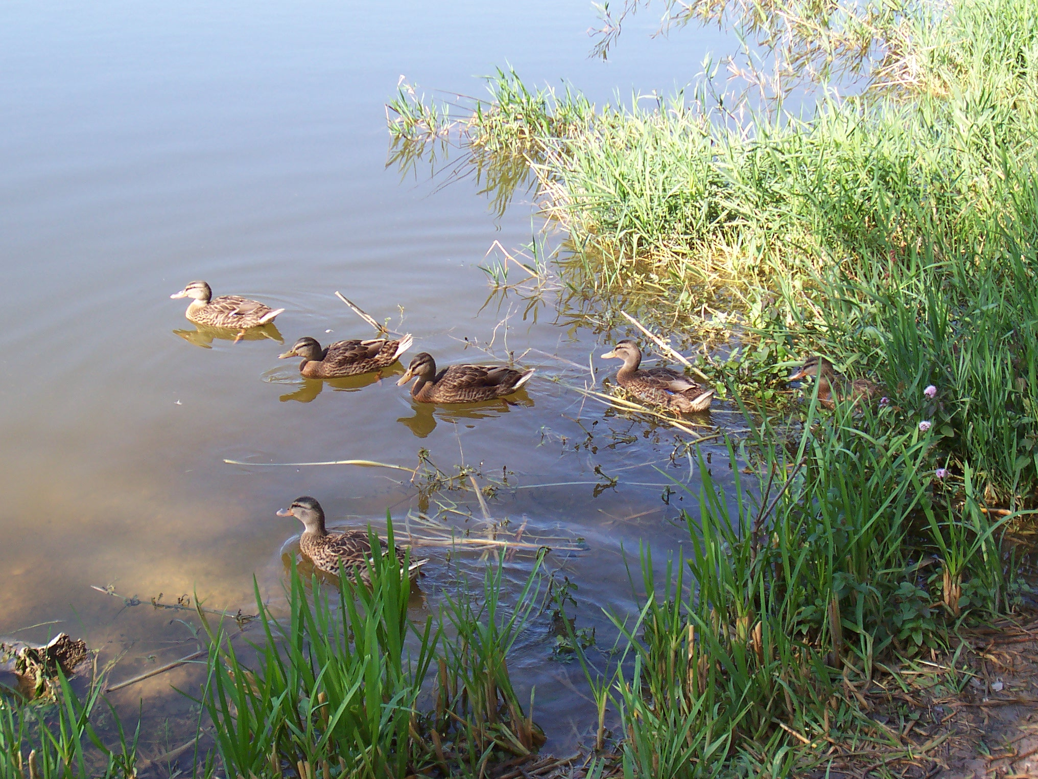 Fauna dell'Oasi di Colfiorito